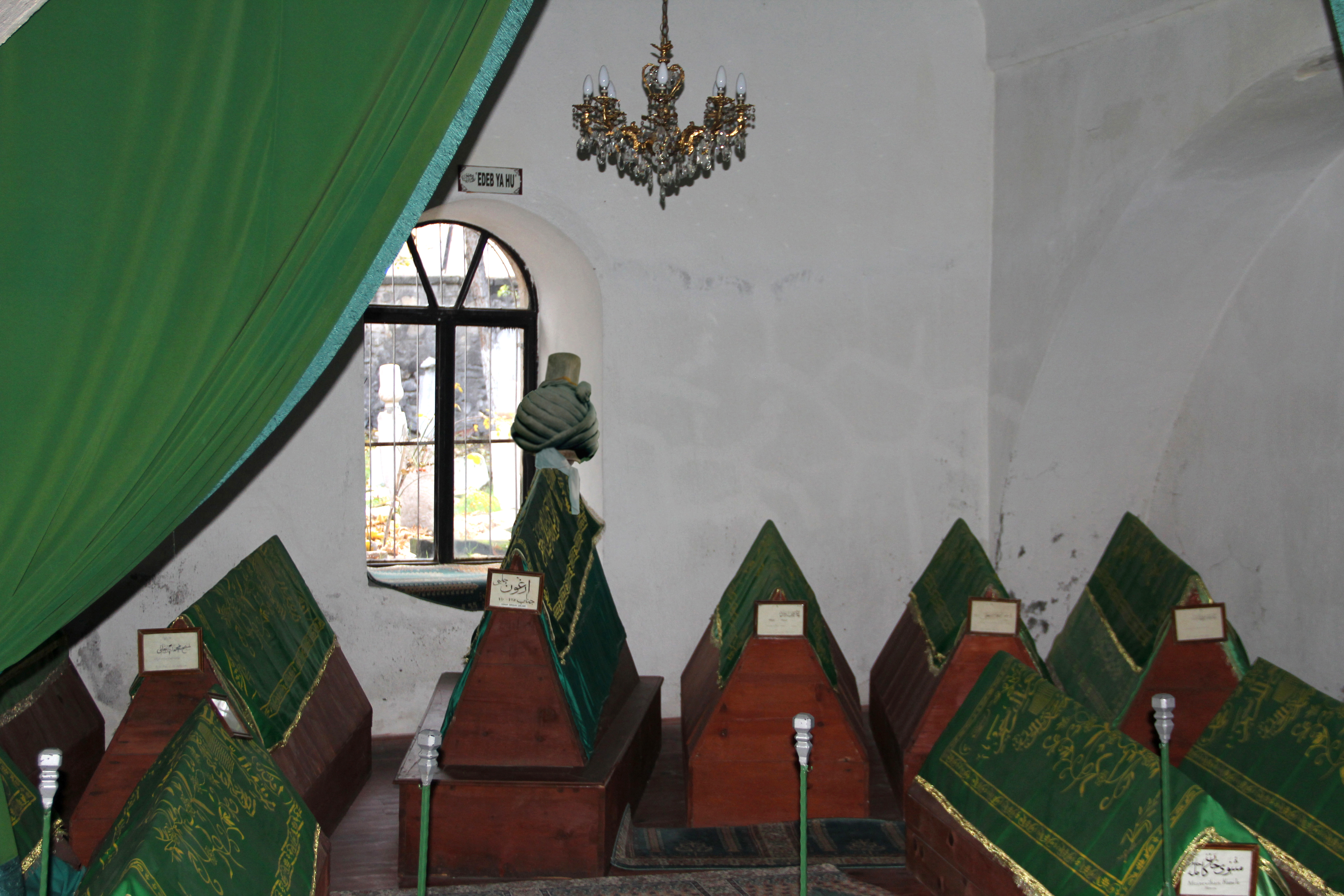 Celaleddin Ergûn Çelebi'nin Kütahya Mevlevîhânesi'ndeki Kabri